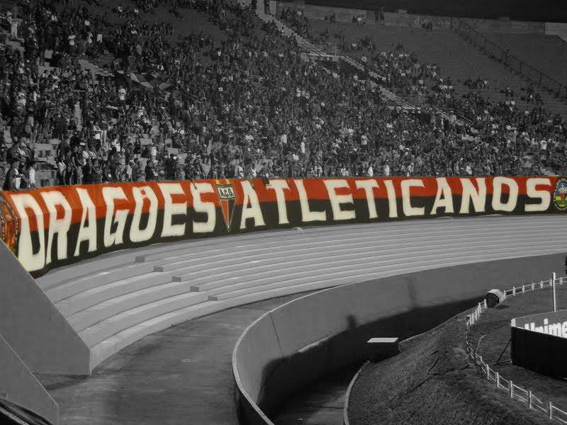 Torcida